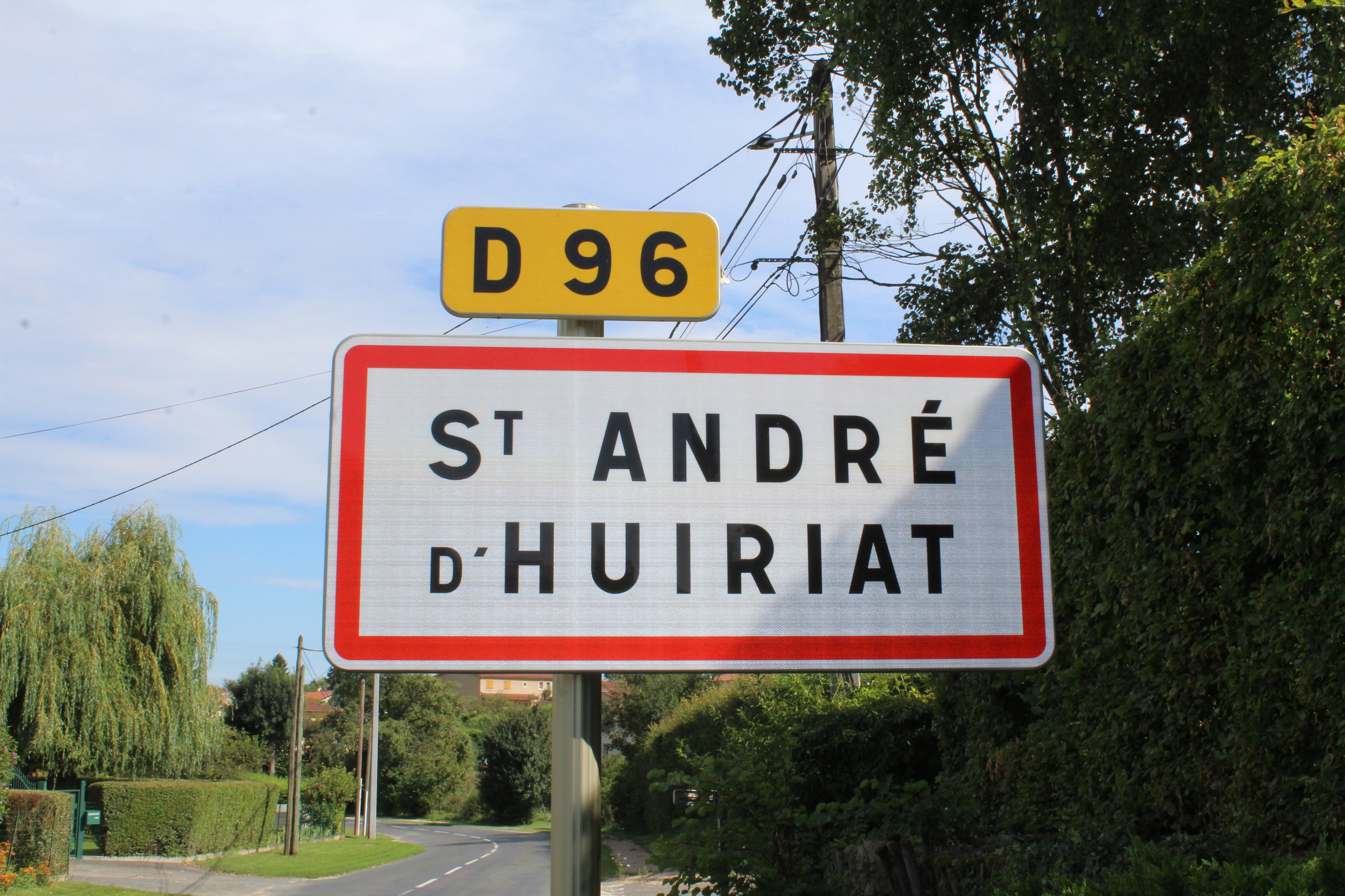 Panneau d'entrée dans Saint-André-d'Huiriat sur la route départementale D96.